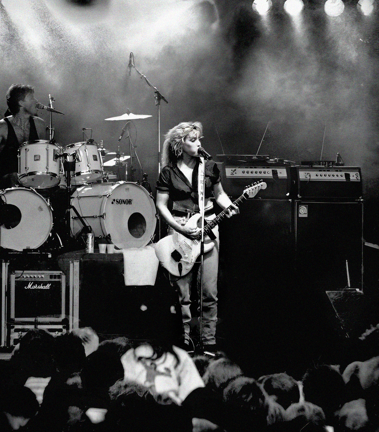 Katrina and the Waves spelade på Malmö festivalen 1988.